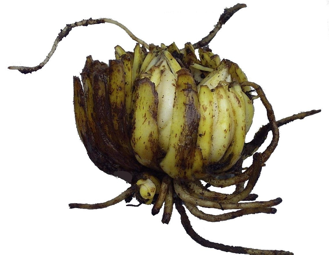 Lilium xanthellum var. luteum Bulbus